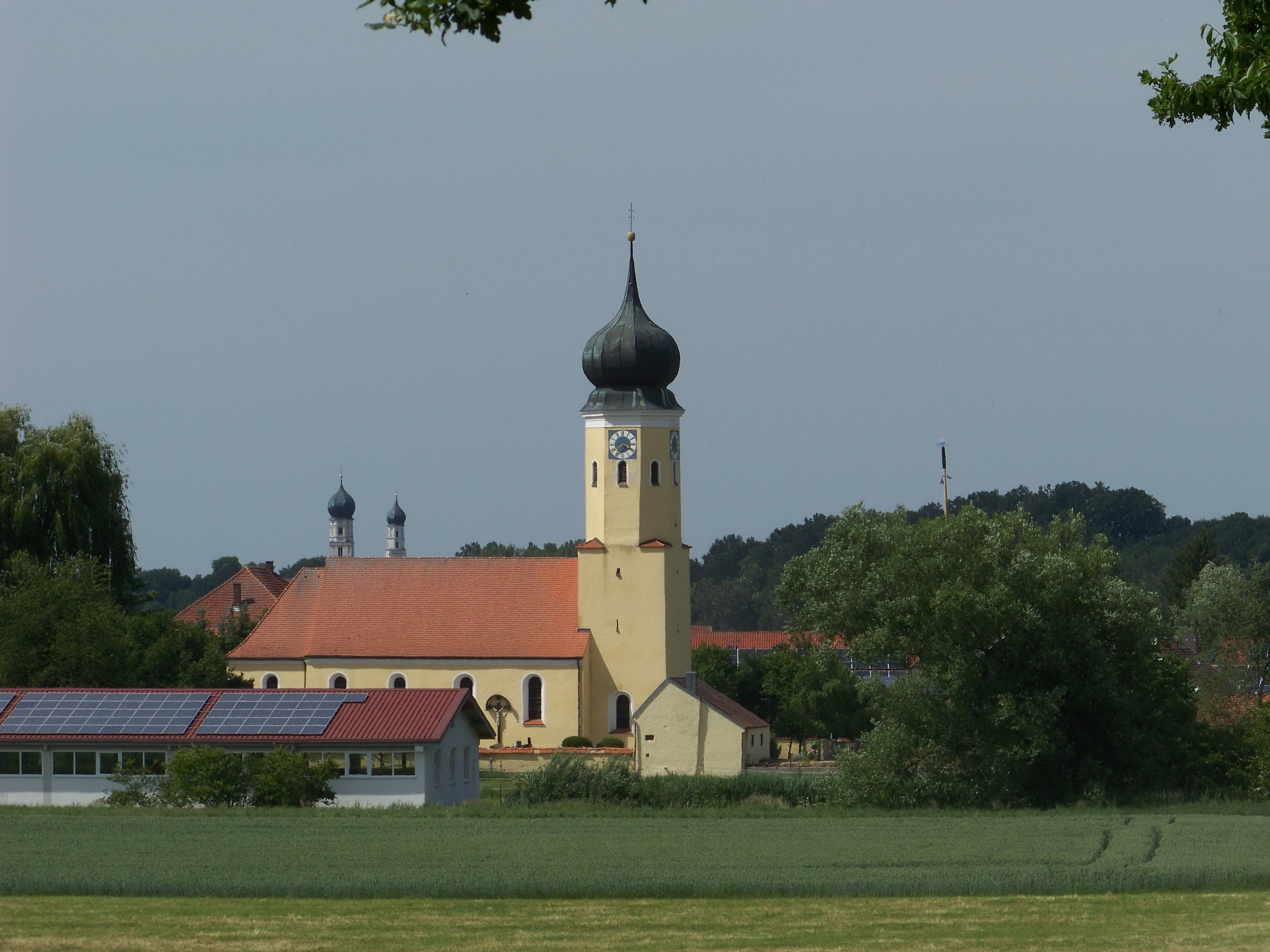 Geiselhöring, Hainsbach Ost 5a. Katholische Pfarrkirche St. Johannes des Täufers. Chorturmanlage der ersten Hälfte des 13. Jahrhunderts, 1711 barockisiert, 1902 verlängert, Turm 1786 erhöht; mit Ausstattung. Blick vom Waldrand bei Ginkofen zur Ortsmitte von Hainsbach. Im Zentrum ist die Kirche St. Johannes mit Zwiebelturm zu sehen. Im Vorgergrund steht die Eisstockhalle. Über dem Kirchenschiff grüßen die Türme der Wallfahrtskirche und der Kreuzkirche vom benachbarten Ort Haindling.